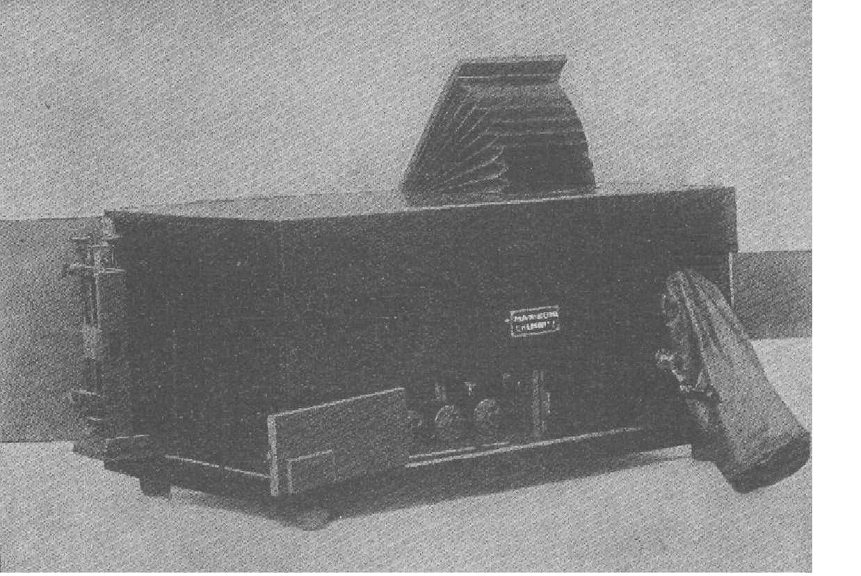 Schleifenoszillograph der Fa. Max Kohl in Chemnitz 1905 Enthält: Synchronmotor, Bogenlampe, Elektromagnet mit 12kHz-Meßschleife, Beobachtungsvorrichtung, photographische Trommel, Vorrichtung für versetzte Mehrfachbelichtung. Abm.: 780mmx480mmx350mm. Preis: 1624 Mark